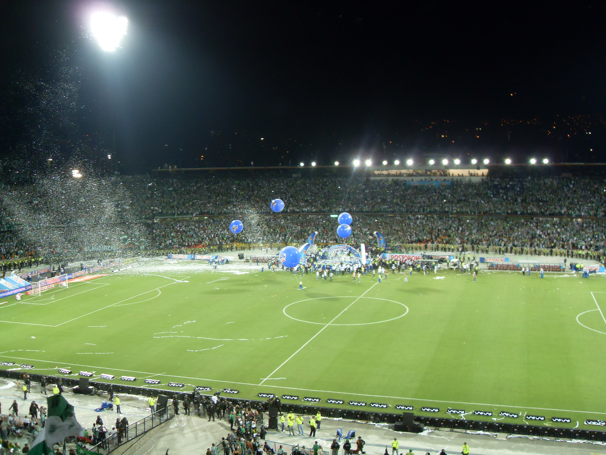 Final 2011-1 Atletico Nacional campeon